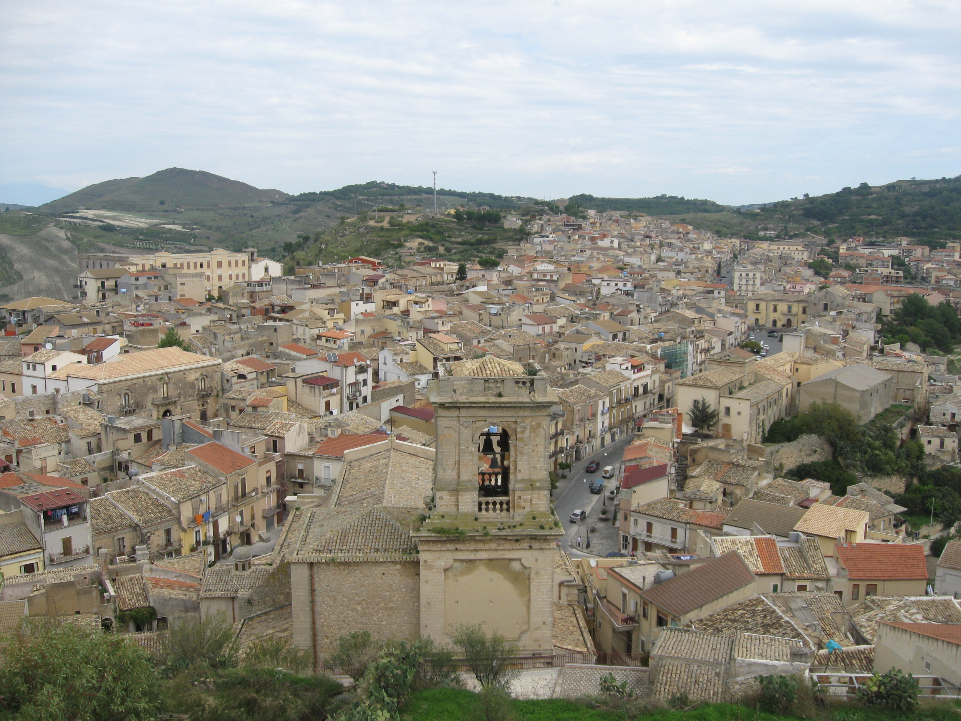 La città di Licodia Eubea vista del Castello Santapau.